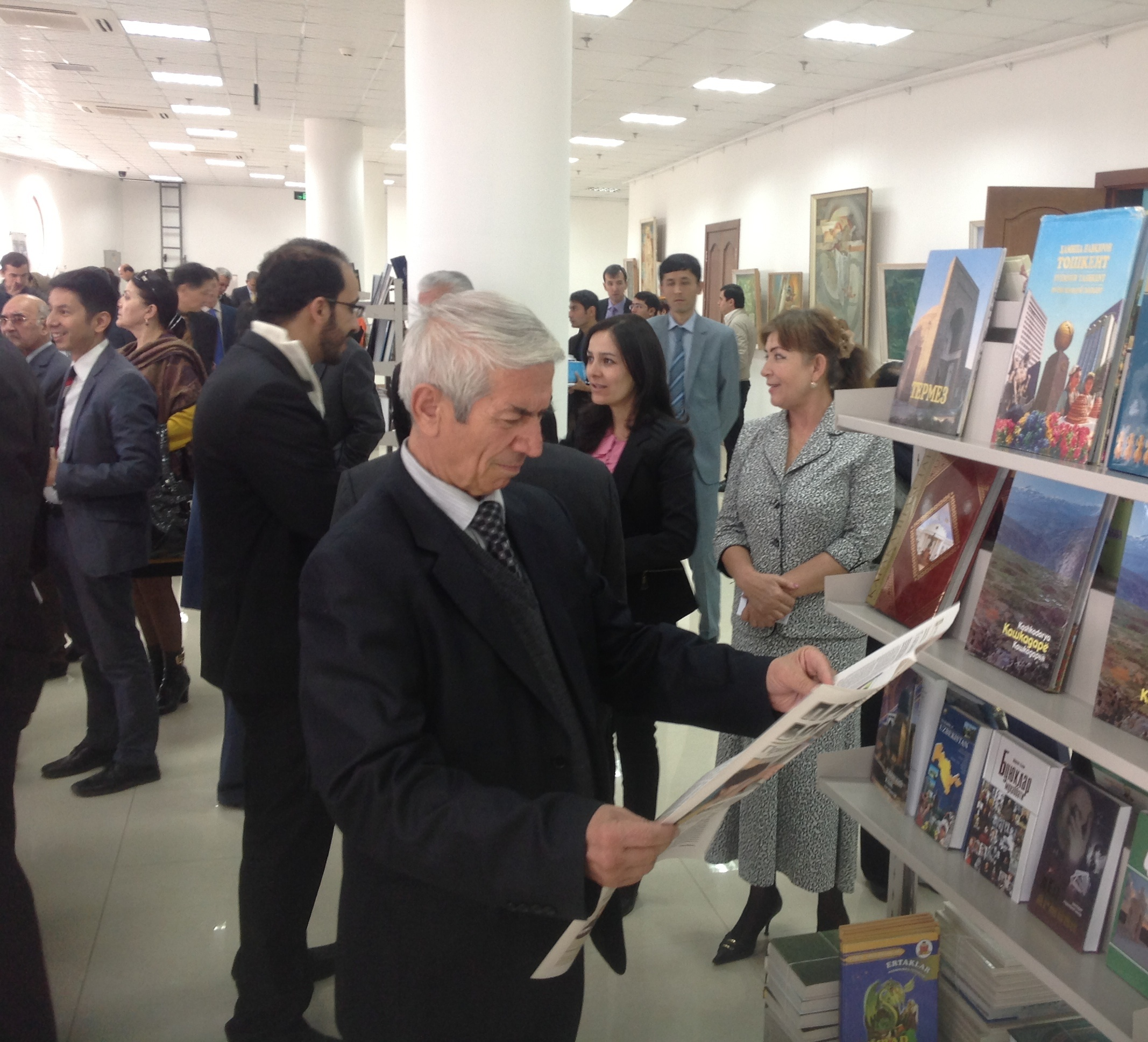 Джурабой Раджабов Отличник раб культуры РТ